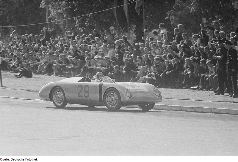 Original image description from the Deutsche FotothekAutomobilrennfahrer in seinem Wagen mit der Nummer 29 beim 6. Leipziger Stadtparkrennen